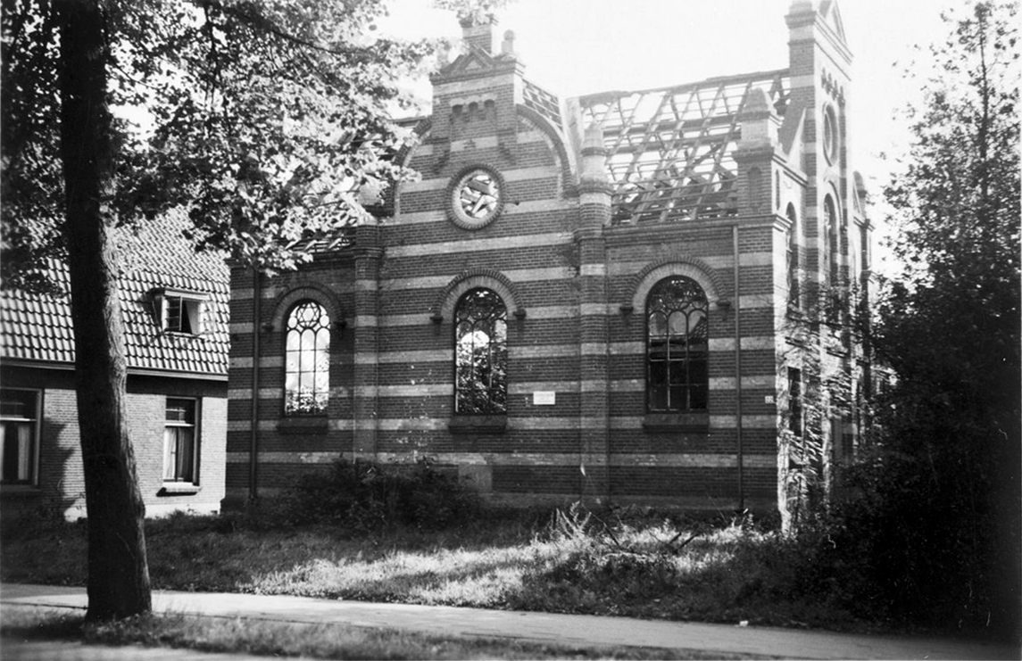 Synagoge: exterieur aanzicht, uit collectie Heer van Leersum